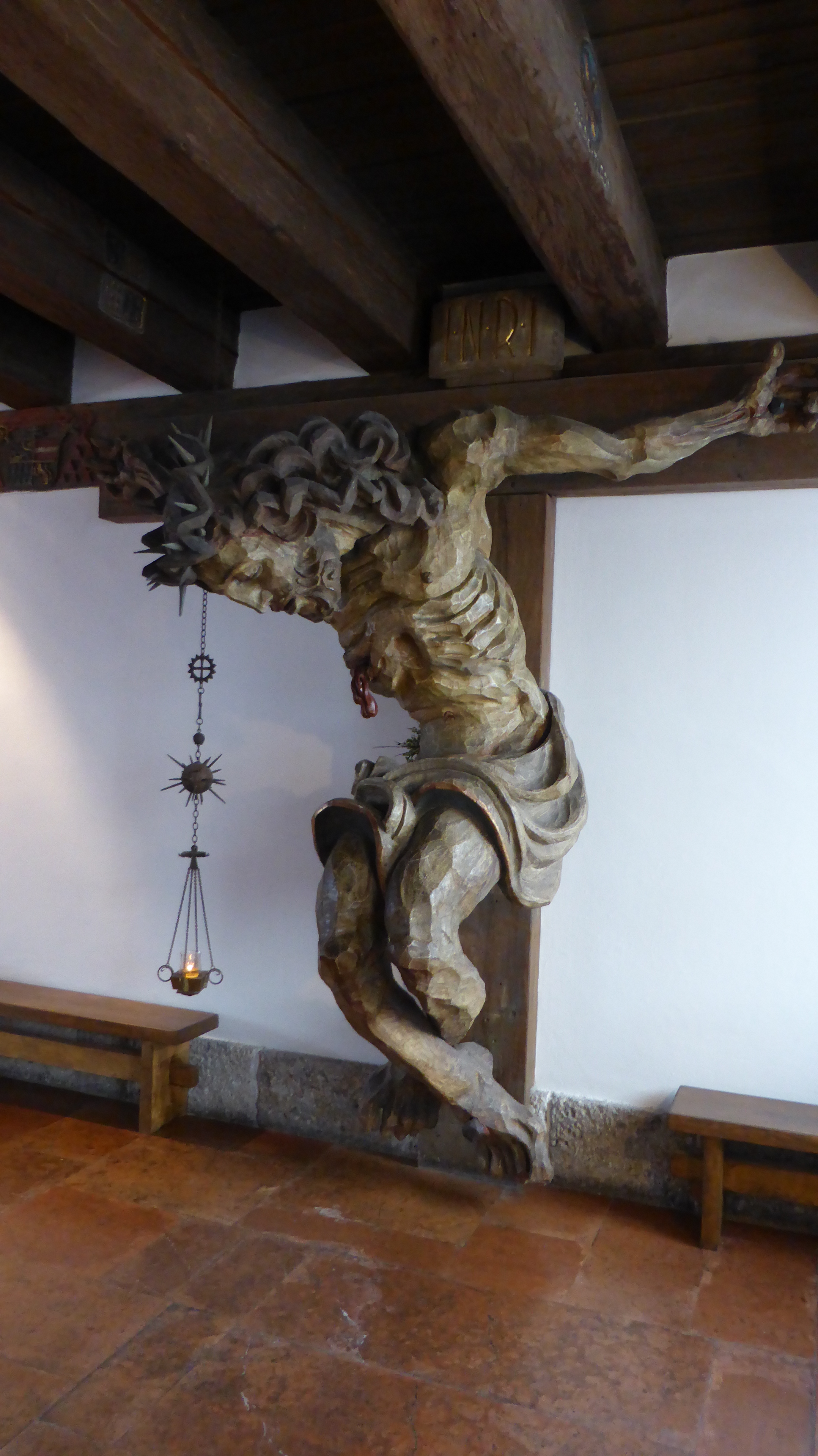 Christusfigur aus Lindenholz von 1925 von Jacob Adlhardt im Srift St. Peter (Salzburg)